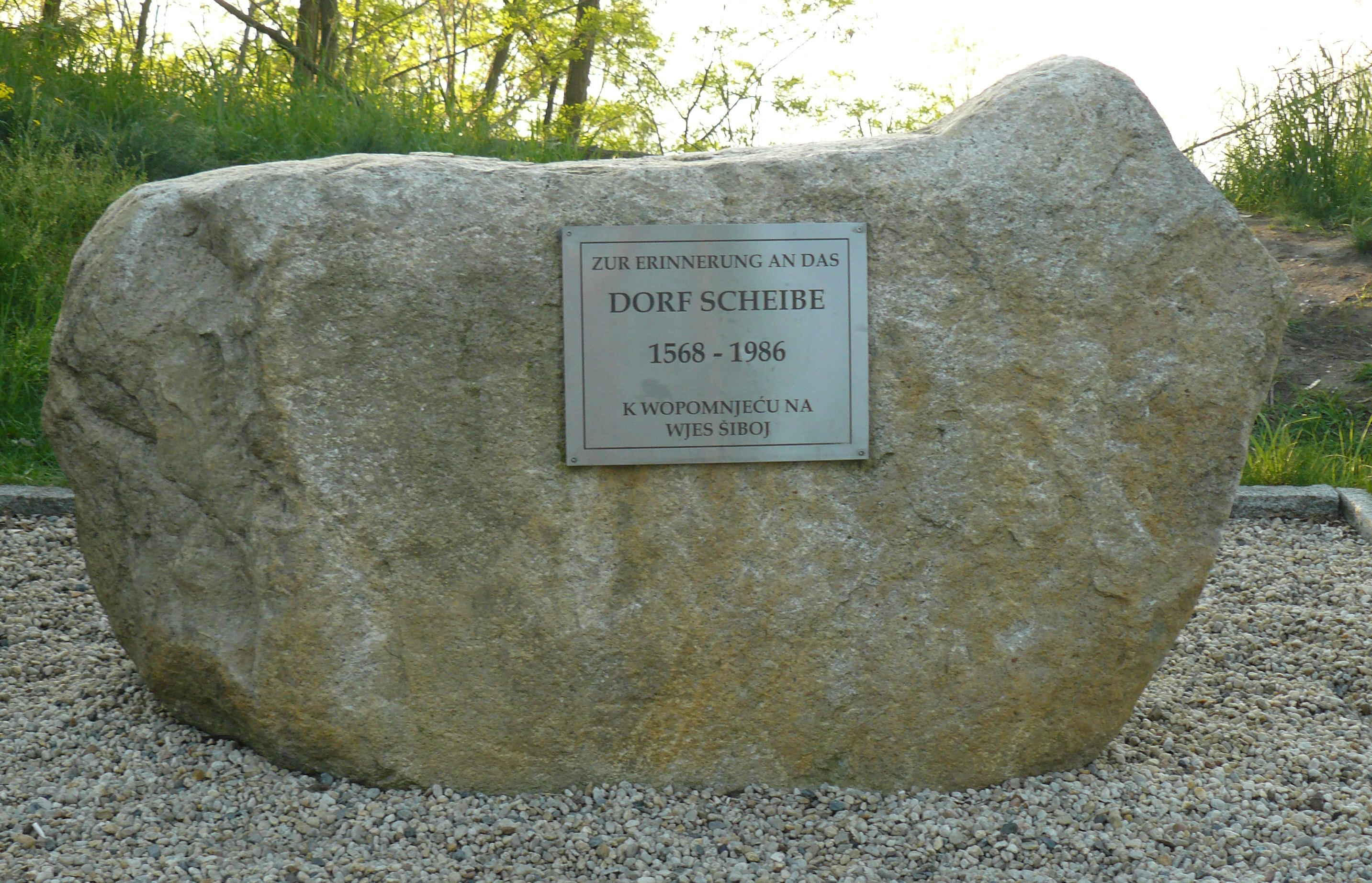 Gedenkstein für den abgebaggerten Ort Scheibe bei Hoyerswerda Hornjoserbsce: Wopomnjenski kamjeń za wotbagrowanu wjesku Šiboj pola Wojerec